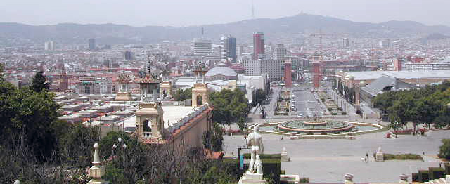 Vue vum Nationalmussée iwwer Barcelona